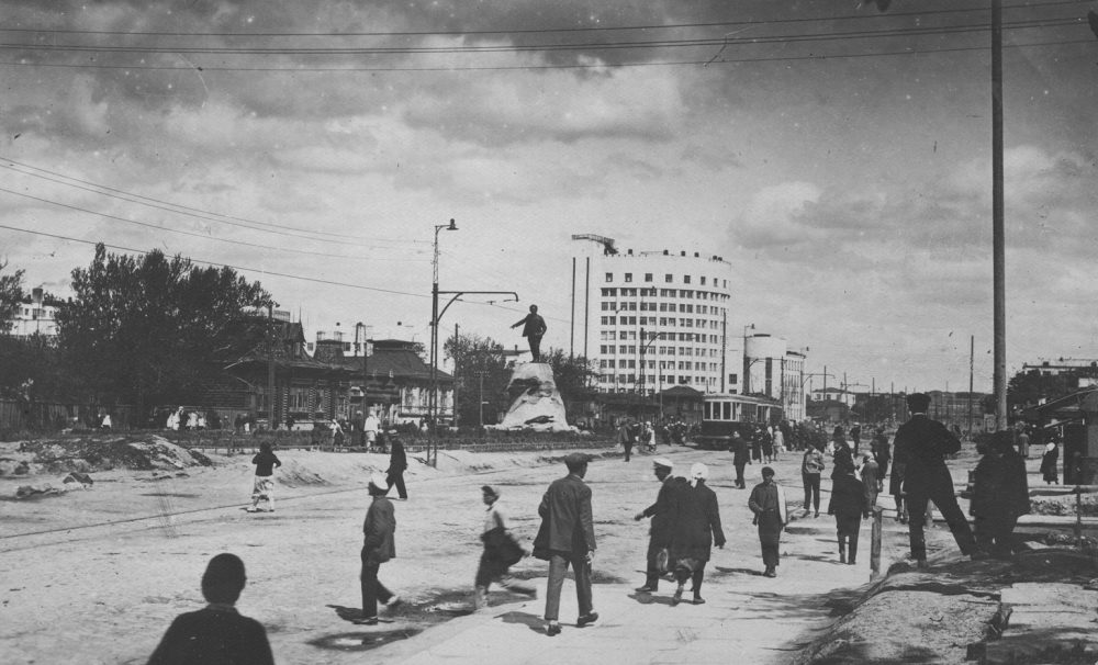 Будущая гостиница «Исеть» достраивается. Яков Свердлов показывает, где должно быть возведено главное здание УрГУ